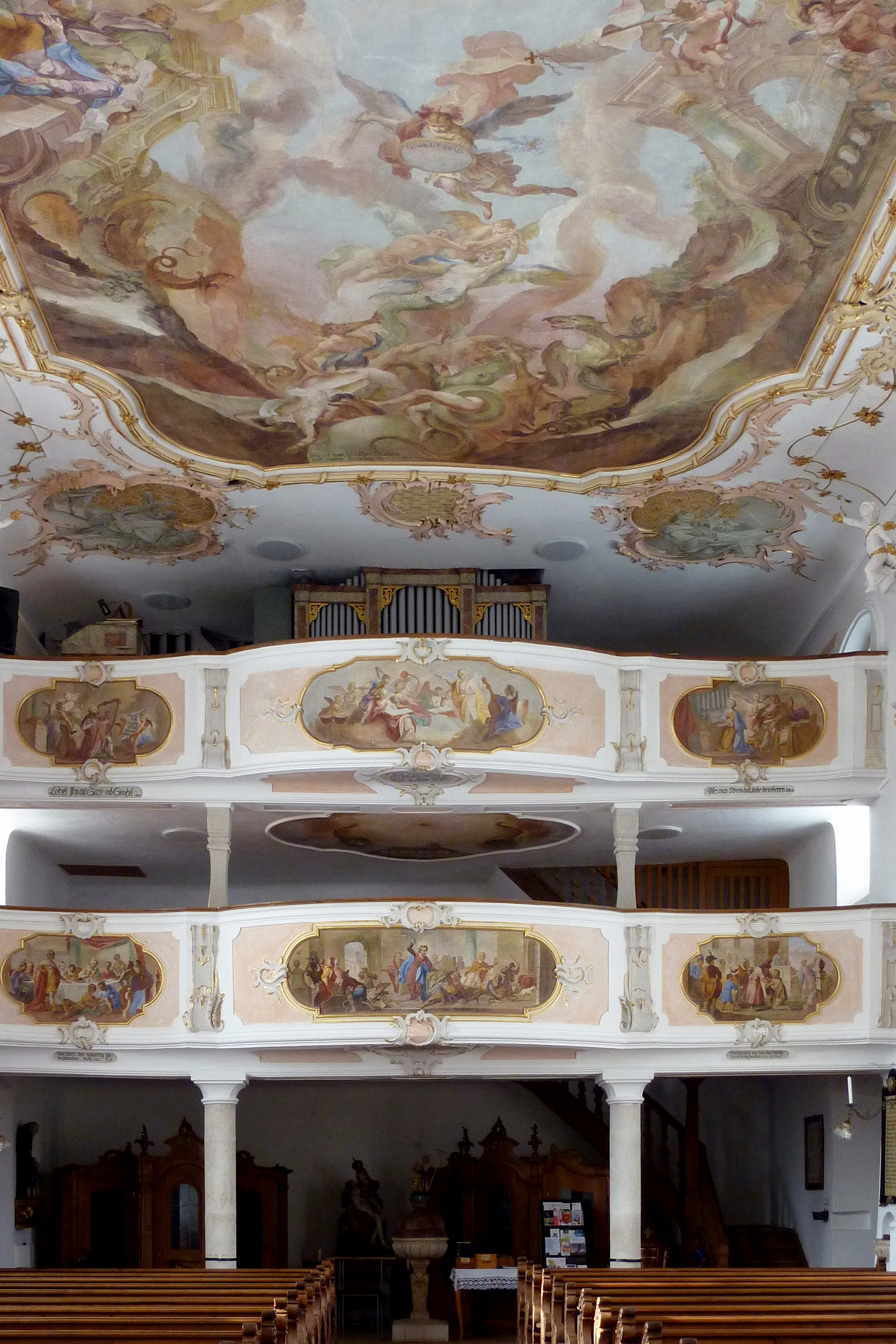 Katholische Pfarrkirche St. Michael in Lutzingen, einer Gemeinde im Landkreis Dillingen an der Donau (Bayern), Doppelempore im Westen